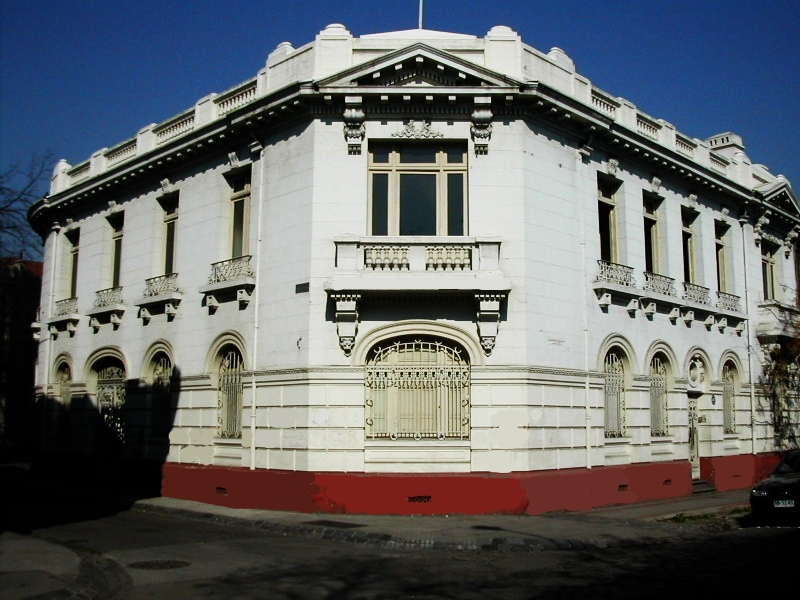 Fachada Palacio Concha